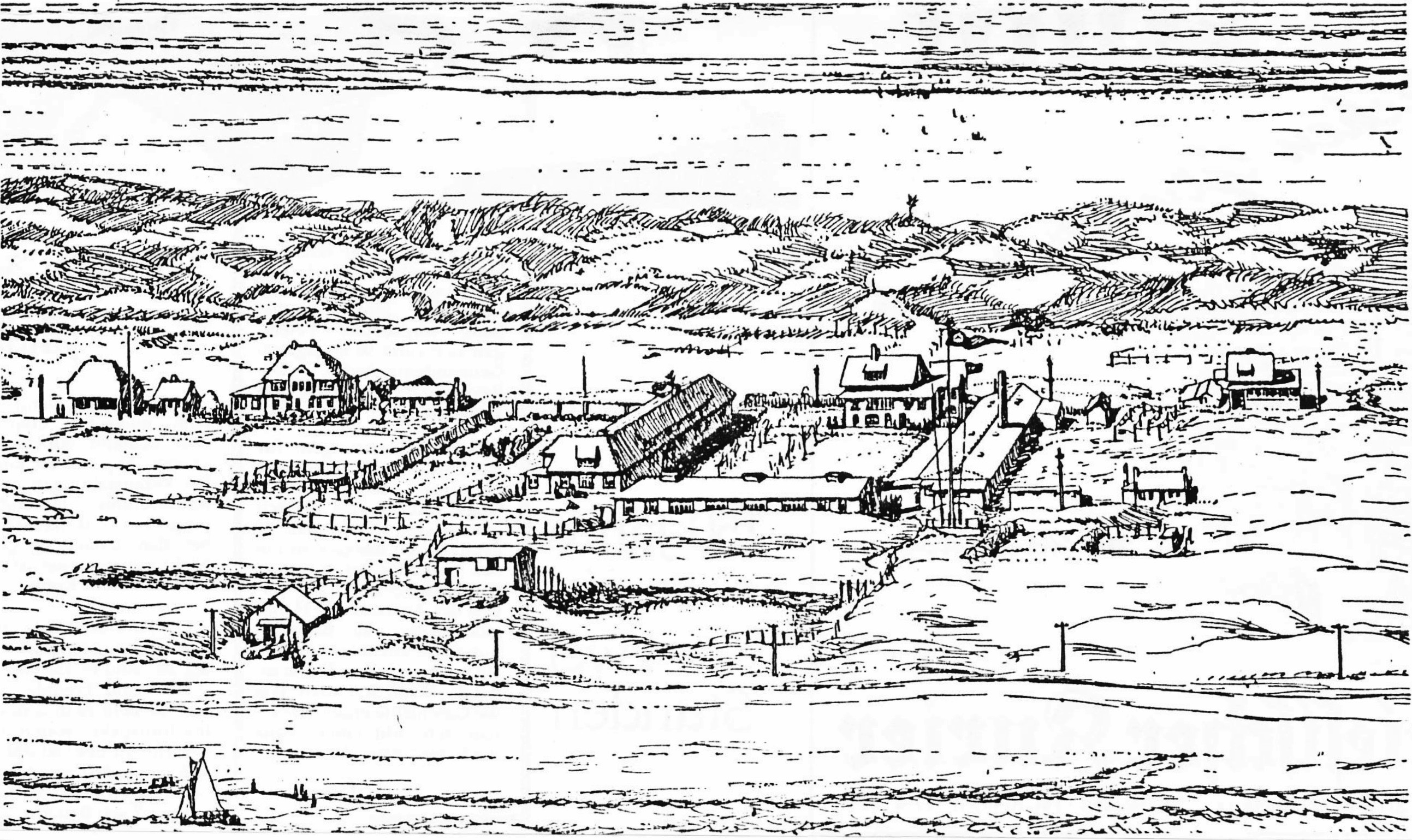 Zeichnung der Schule am Meer auf der Nordseeinsel Juist (Ostfriesland) aus dem Jahr 1929. In der Bildmitte erkennt man die Arche an ihrer charakteristischen L-Form. Sie ist das westliche Gebäude innerhalb des Kernbereichs der Schule. Ihr gegenüber (östlich) sieht man die Westfalenhalle (hoher Schornstein), an die sich nordöstlich zwei Koksschuppen anschließen, einer angebaut, einer freistehend. Im Norden ist das Schulhauptgebäude Diesseits, in dessen flacherem östlichen Anbau der Speisesaal war. Von ihm aus führt ein schnurgerader Weg nach Norden in die Dünen, zum Strand. Gegenüber dem Diesseits steht südlich das Jenseits. Südlich der Westfalenhalle erkennt man den Flaggenplatz, an dem die Schulflagge mit Logo und darunter ein Kameradschaftswimpel gehisst sind. Südlich des Jenseits liegt der Olymp, auf dem ein geräumiger Stall errichtet wurde. Darunter, noch weiter südlich, steht das Bootshaus der Schule. Links oben (im Nordwesten) sieht man das do, ein einstöckiges Gebäude, rechts dahinter der flache Anbau re, links daneben (westlich) der begonnene Anbau mi, der später zu einer L-Form nach Westen verlängert und noch später zu einer U-Form mit dem auf der Zeichnung abgebildeten kleinen Ahrens-Haus verbunden wurde. Rechts (östlich) des do steht das Ubben-Mamminga-Haus.